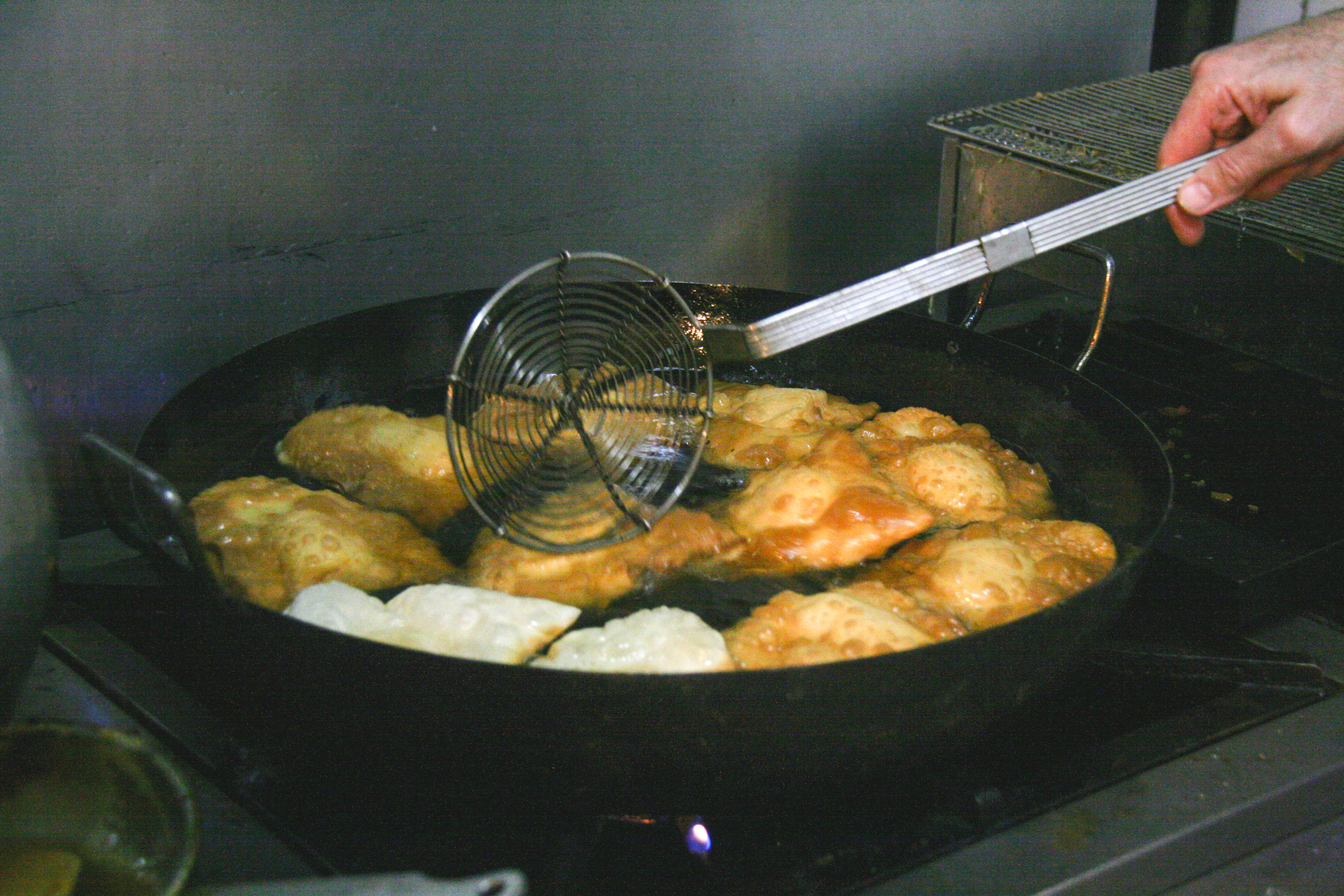 Friendo bartolillos